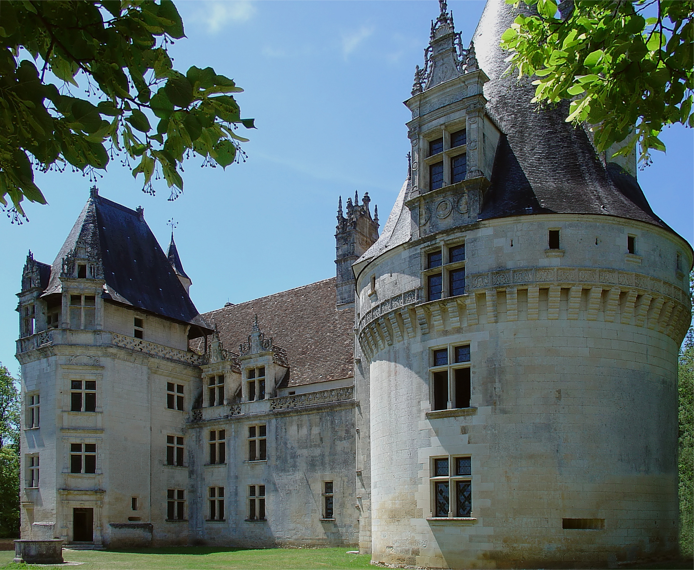 Schloss Puyguilhem in der Nähe der Ortschaft Villars im Département Dordogne des französischen Périgord.